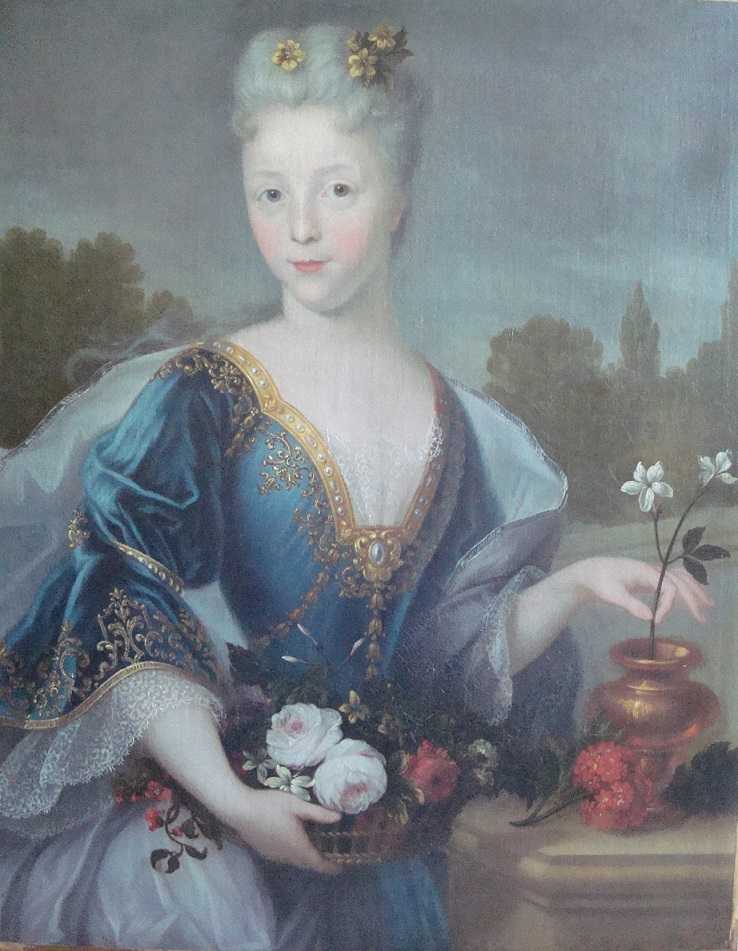 Portrait d'une Dame de la cour